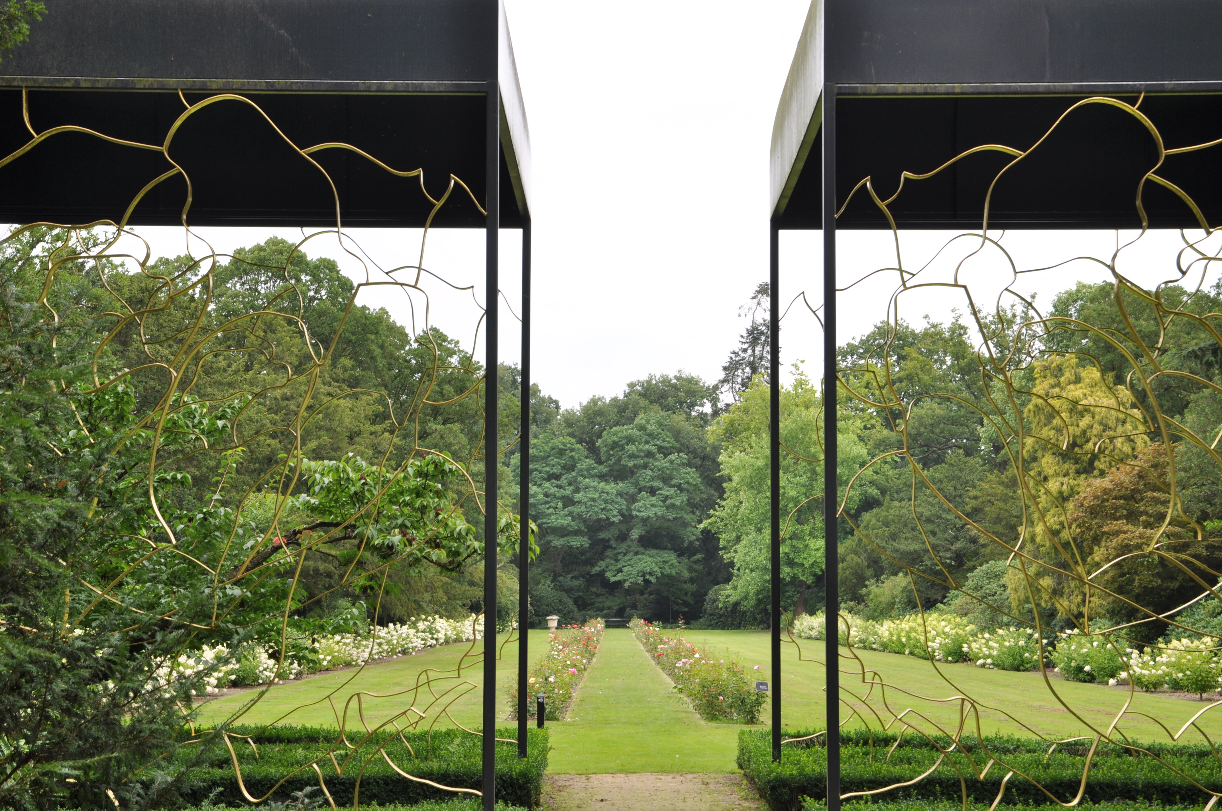 Rozentuin op het landgoed Twickel bij Delden.